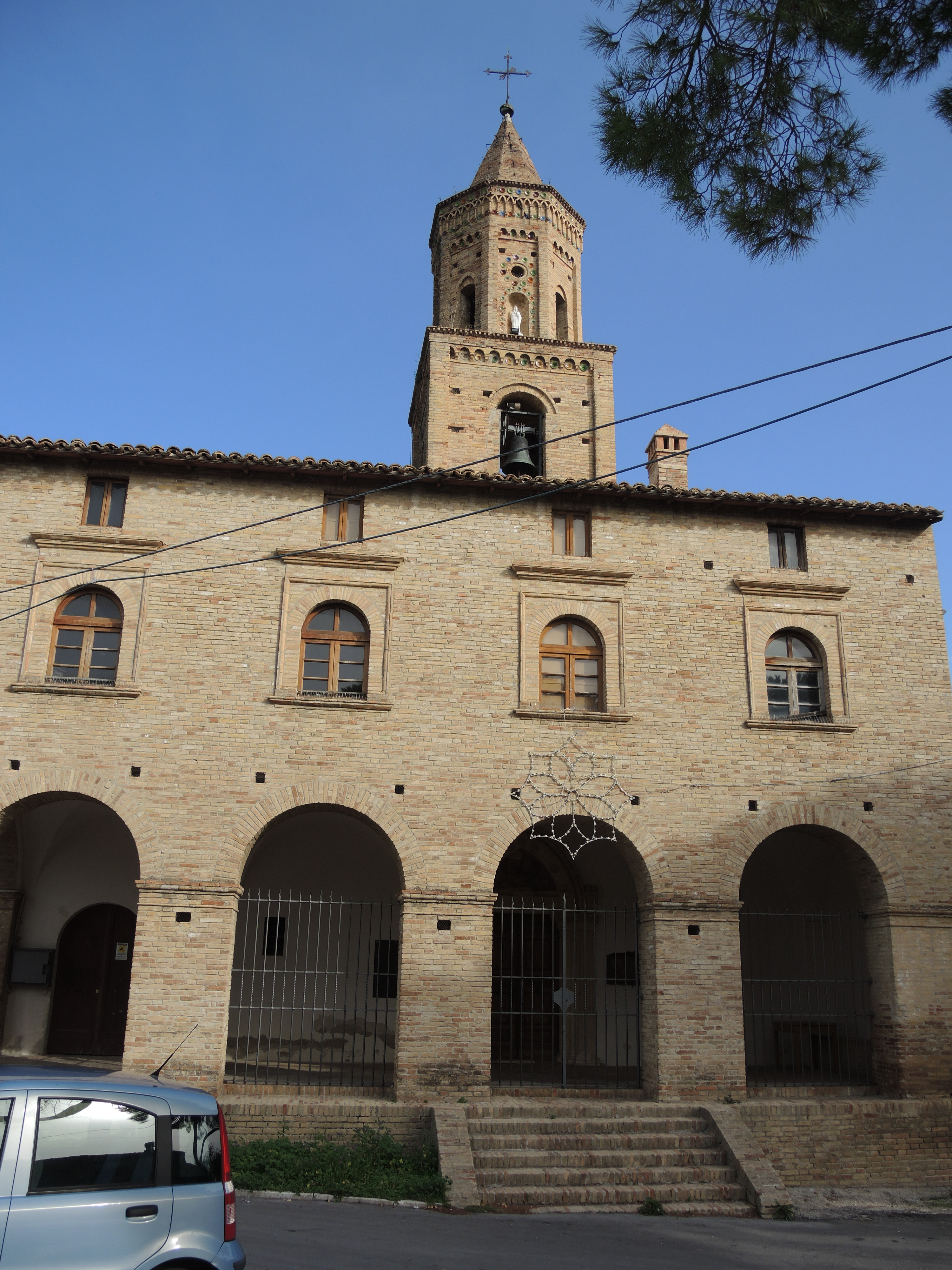 Loreto Aprutino: Chiesa di Santa Maria in Piano